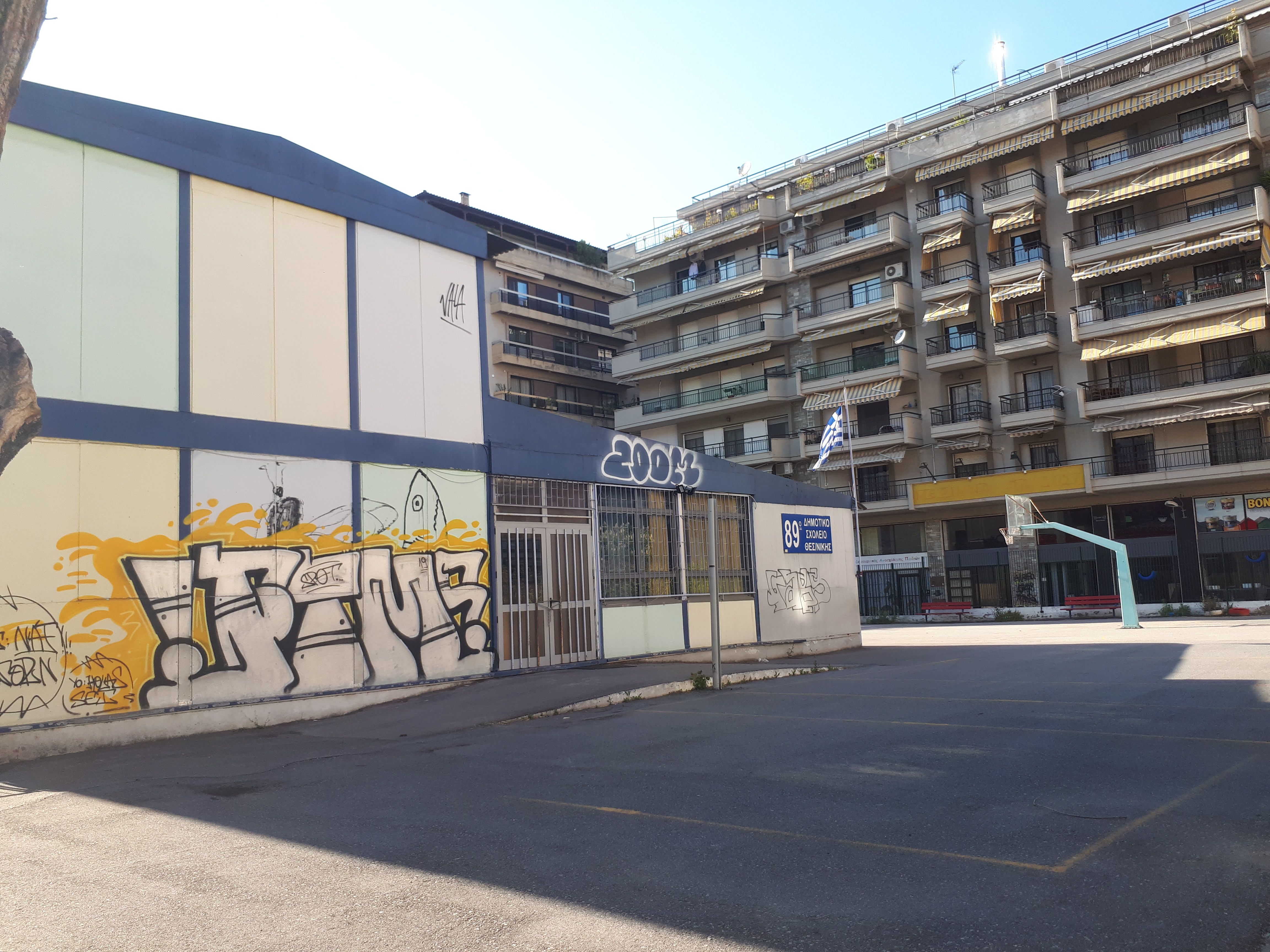 Λυόμενο σχολείο, Λεωφόρος Β.Όλγας Θεσσαλονίκη